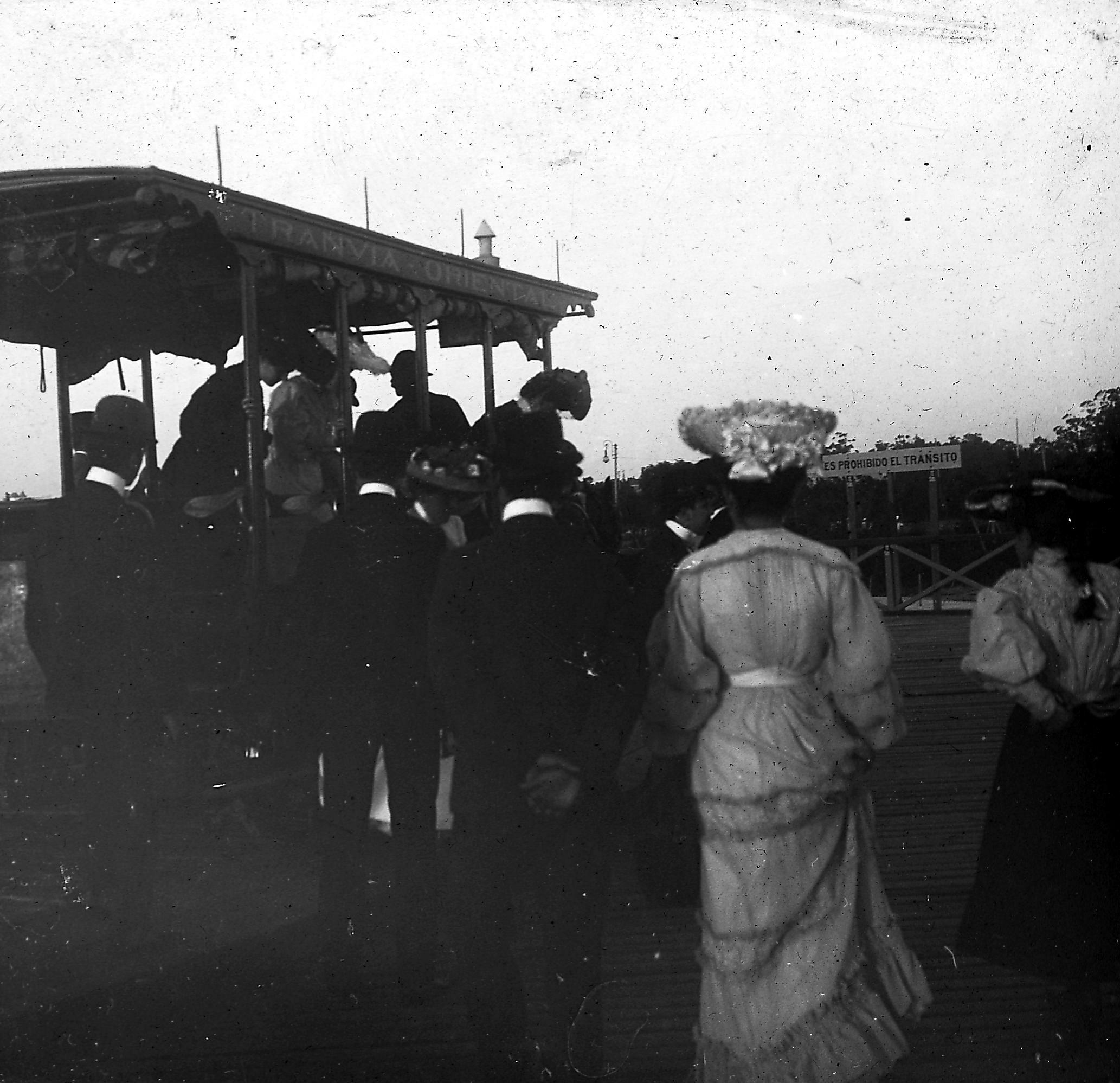 C15f139.Tranvía sobre terraza de Ramírez